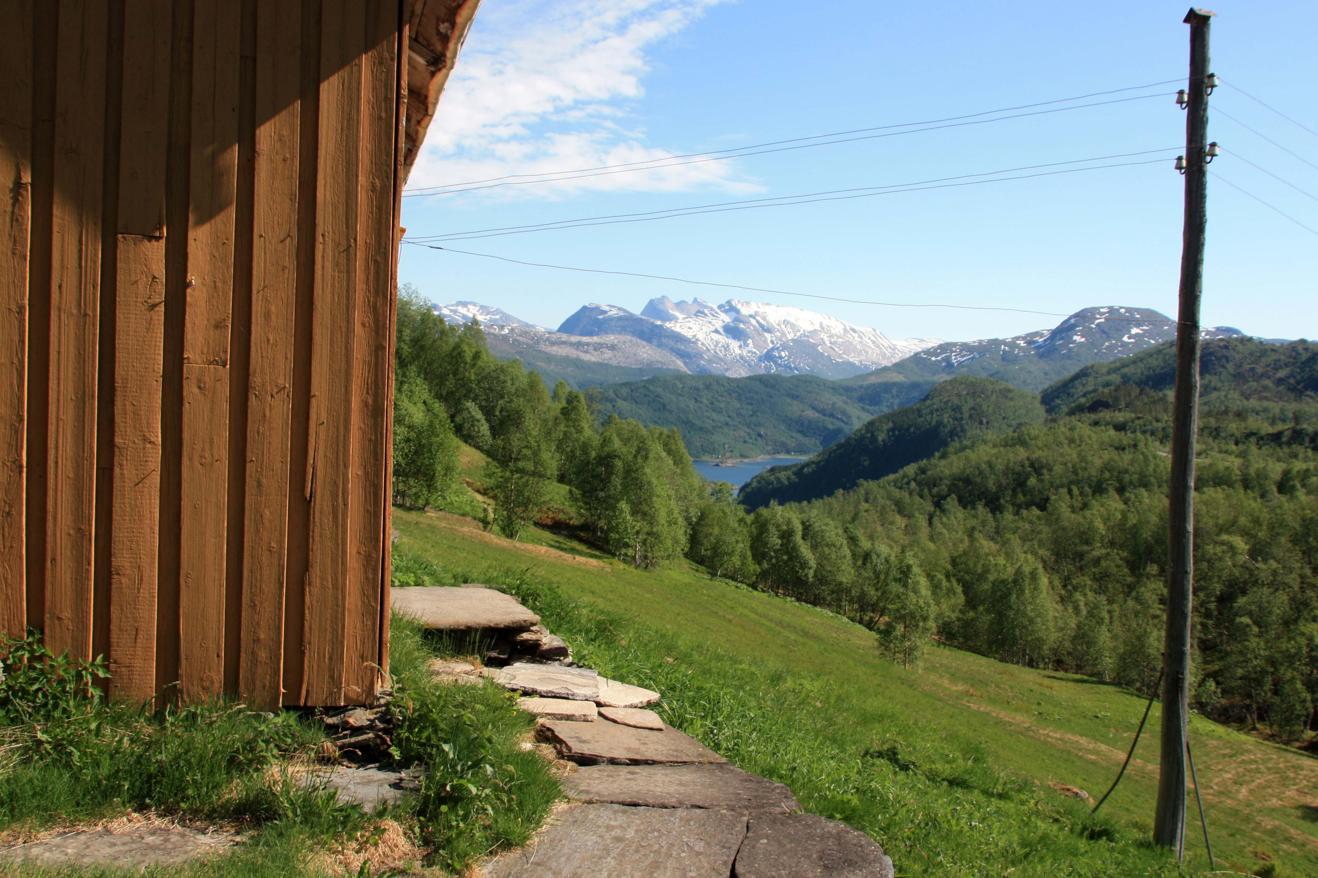 Fra Husmannsplassen Kjelvik med utsikt til Leirfjorden.